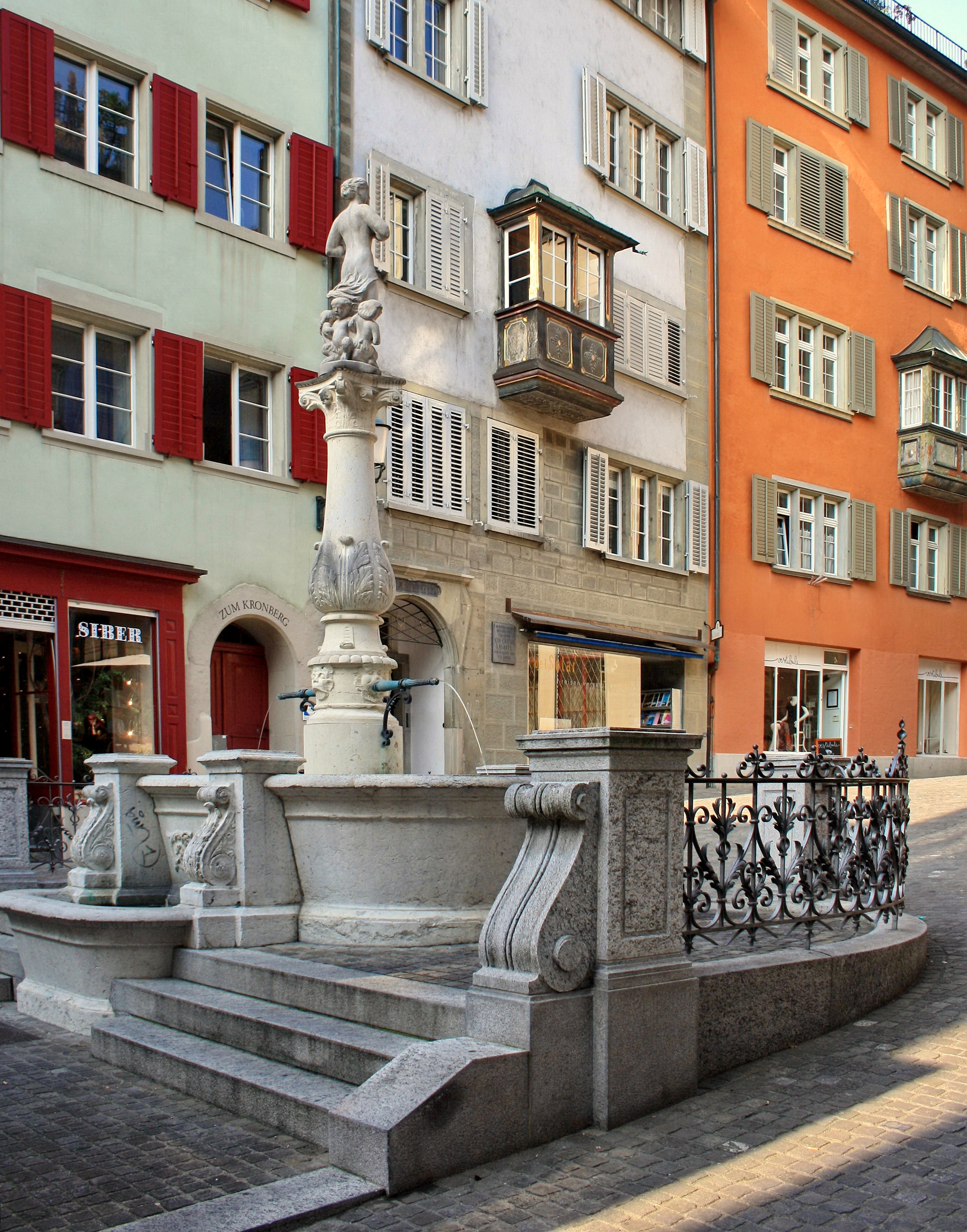 Napfbrunnen at Napfplatz in Zürich-Rathaus quarter, Spiegelgasse in the background.